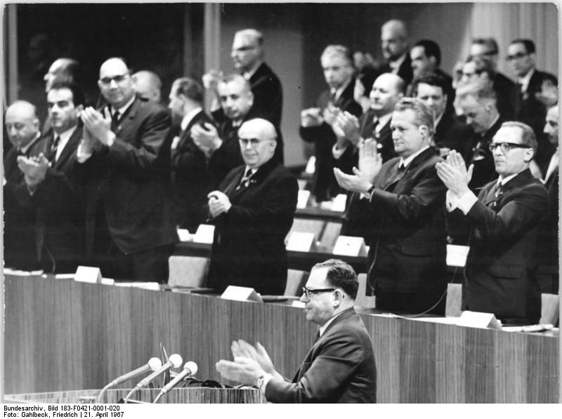 Zentralbild Gahlbeck 21.4.1967 bgm-da. VII. Parteitag der SED - 21.4.1967. Blick auf das Präsidium während der Grußansprache von Bert Ramelson, Mitglied des Politischen Komitees der Kommunistischen Partei Großbritanniens.